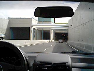 Westerscheldetunnel. Eigen foto.